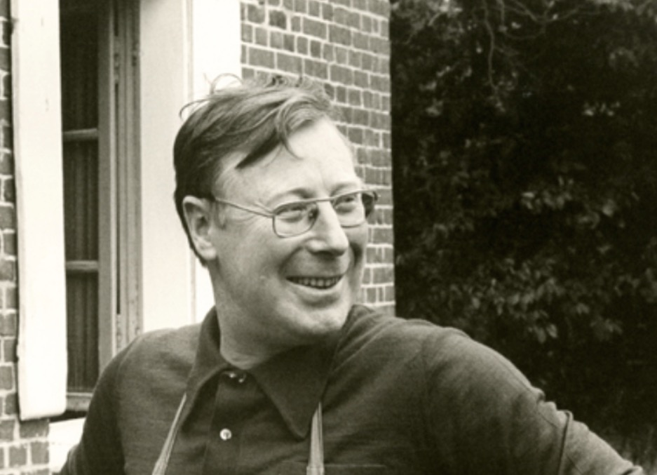 Jean Jacquart (1928-1998), historien, vers 1947.